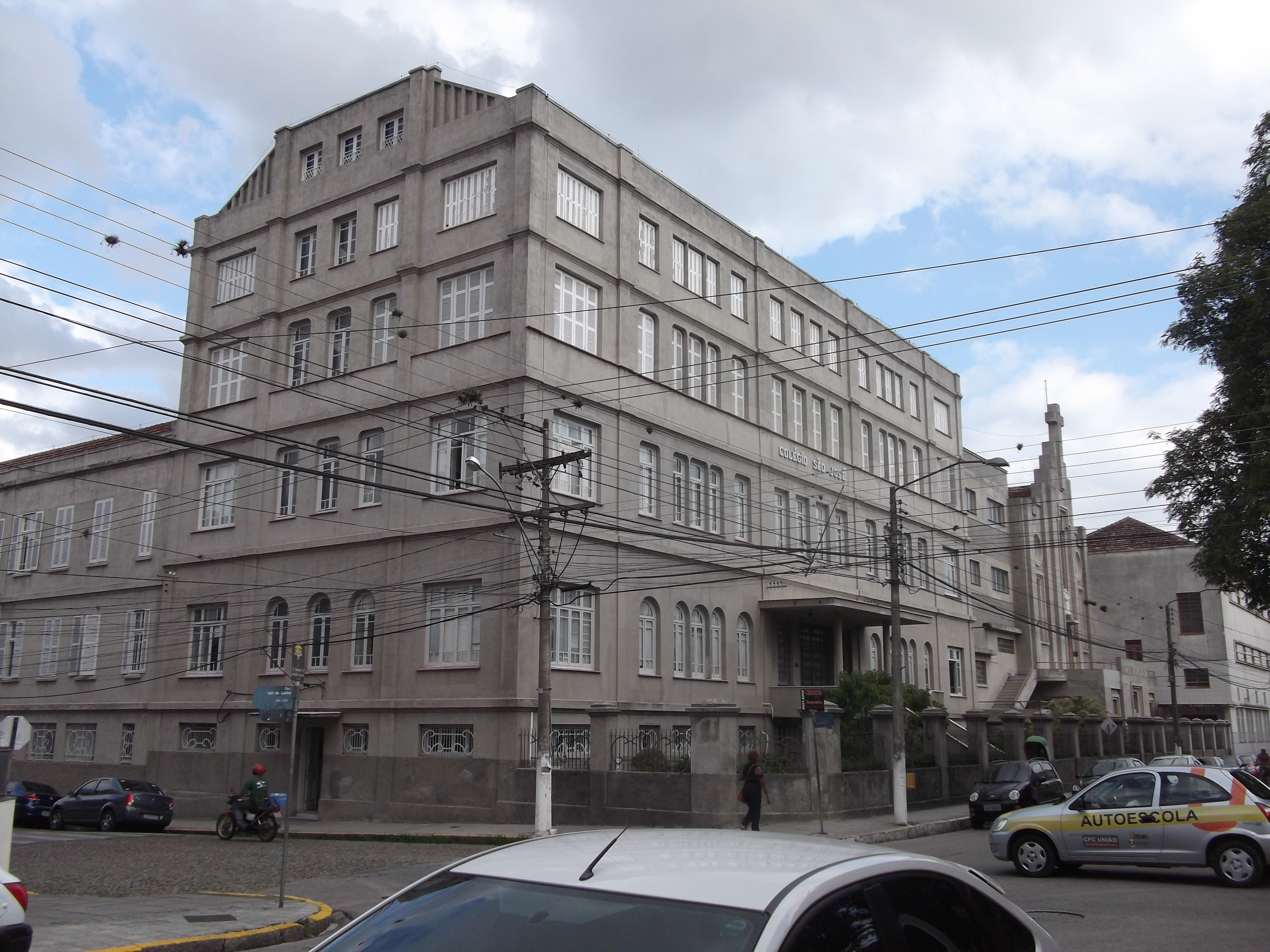 Colégio São José, Pelotas, Brasil